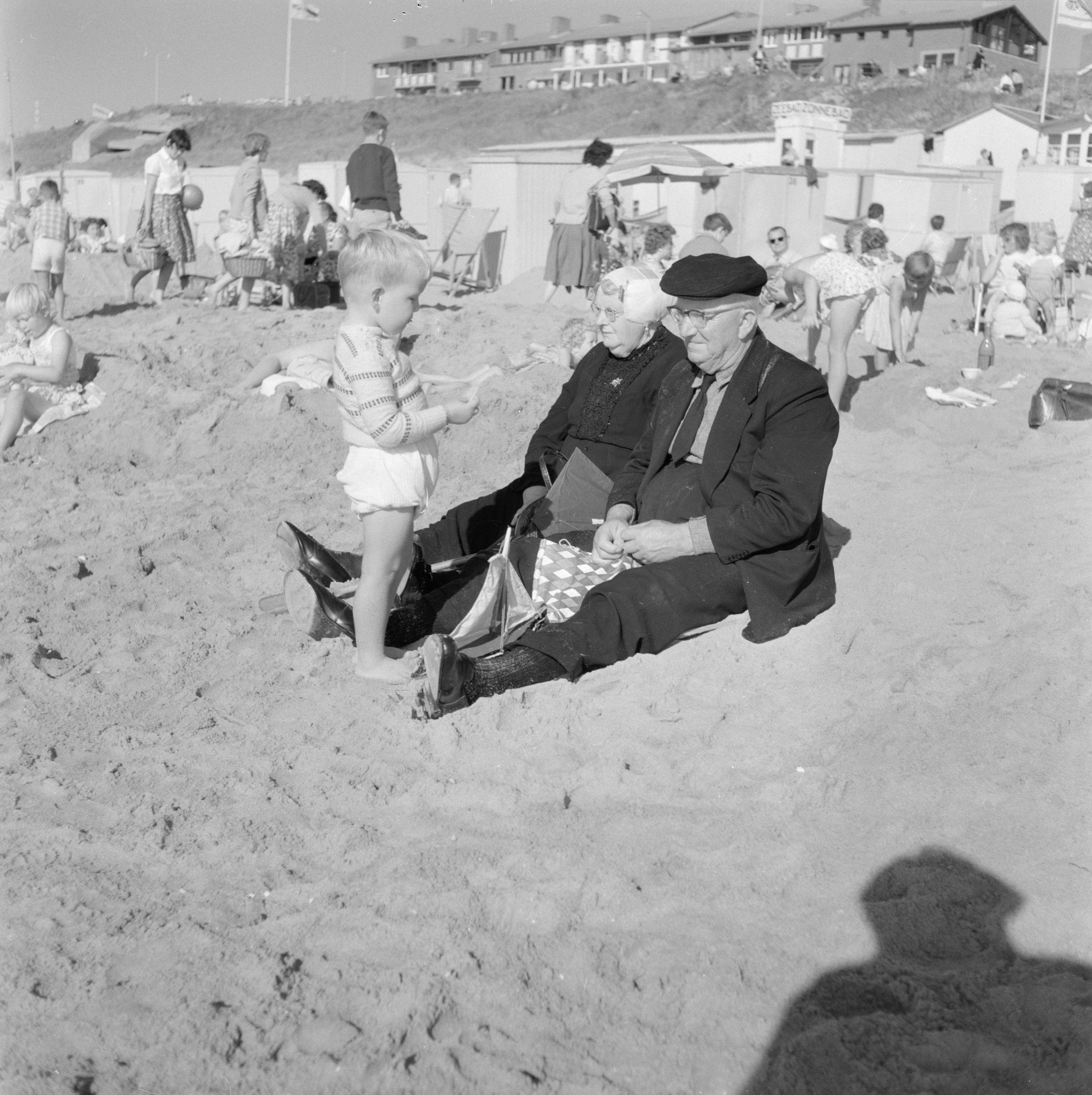 Collectie / Archief : Fotocollectie Van de Poll Reportage / Serie : Katwijk Beschrijving : Oud echtpaar in klederdracht met een jongetje op het strand Datum : 1960 Locatie : Katwijk, Zuid-Holland Trefwoorden : klederdrachten, stranden Fotograaf : Poll, Willem van de Auteursrechthebbende : Nationaal Archief Materiaalsoort : Negatief (6x6) Nummer archiefinventaris : bekijk toegang 2.24.14.02 Bestanddeelnummer : 254-4407